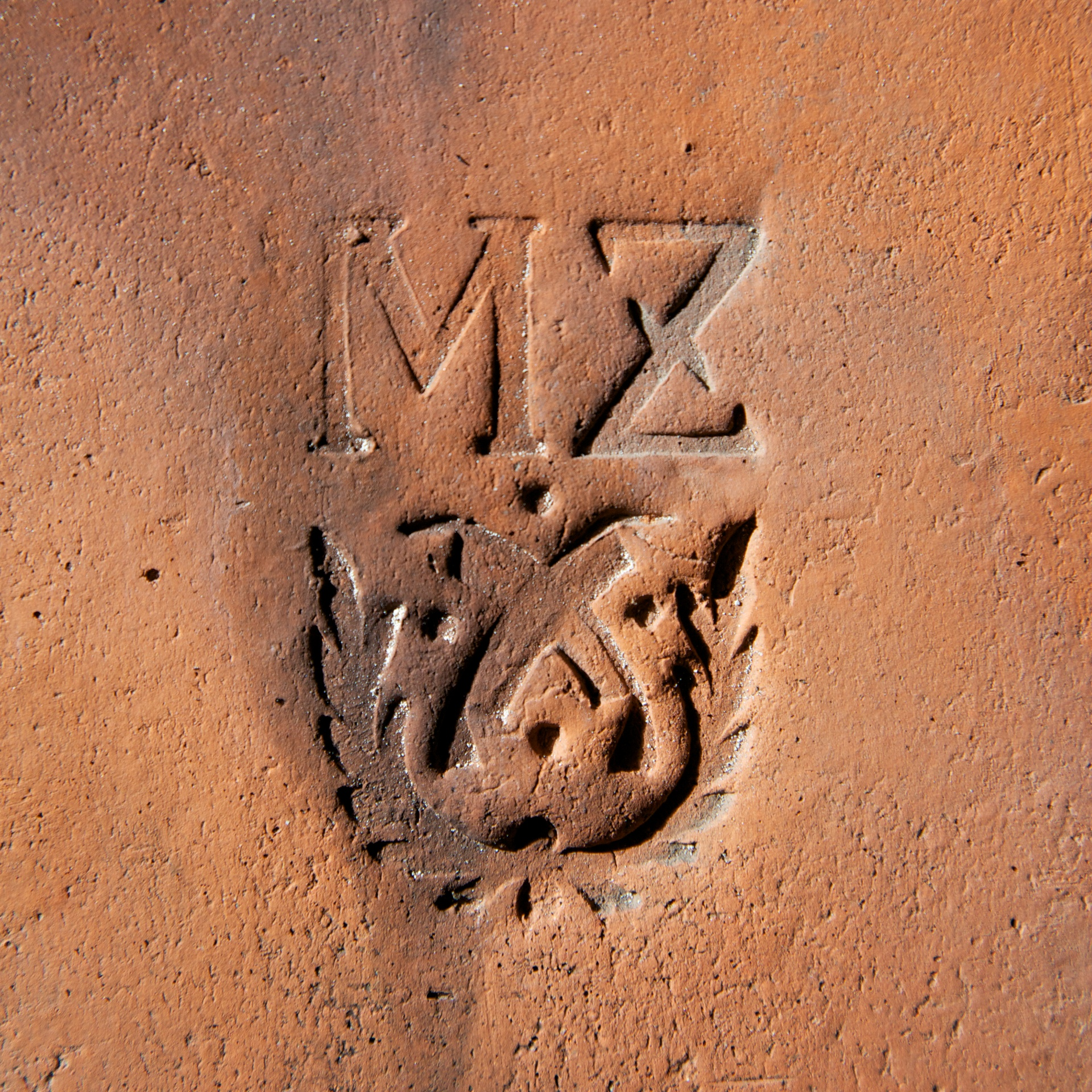 Dachziegel (Wiener Tasche) mit dem Zeichen „Zwei Strohmesser“ der ehemaligen Sensenschmiede Blumau und den Initialen MZ (Michael Zeitlinger)